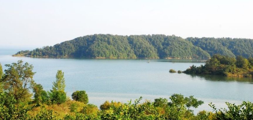 Dan river in China